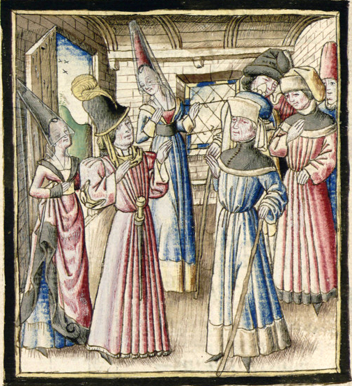 ChampionDesDames-Grenoble-Ms0352-f052v